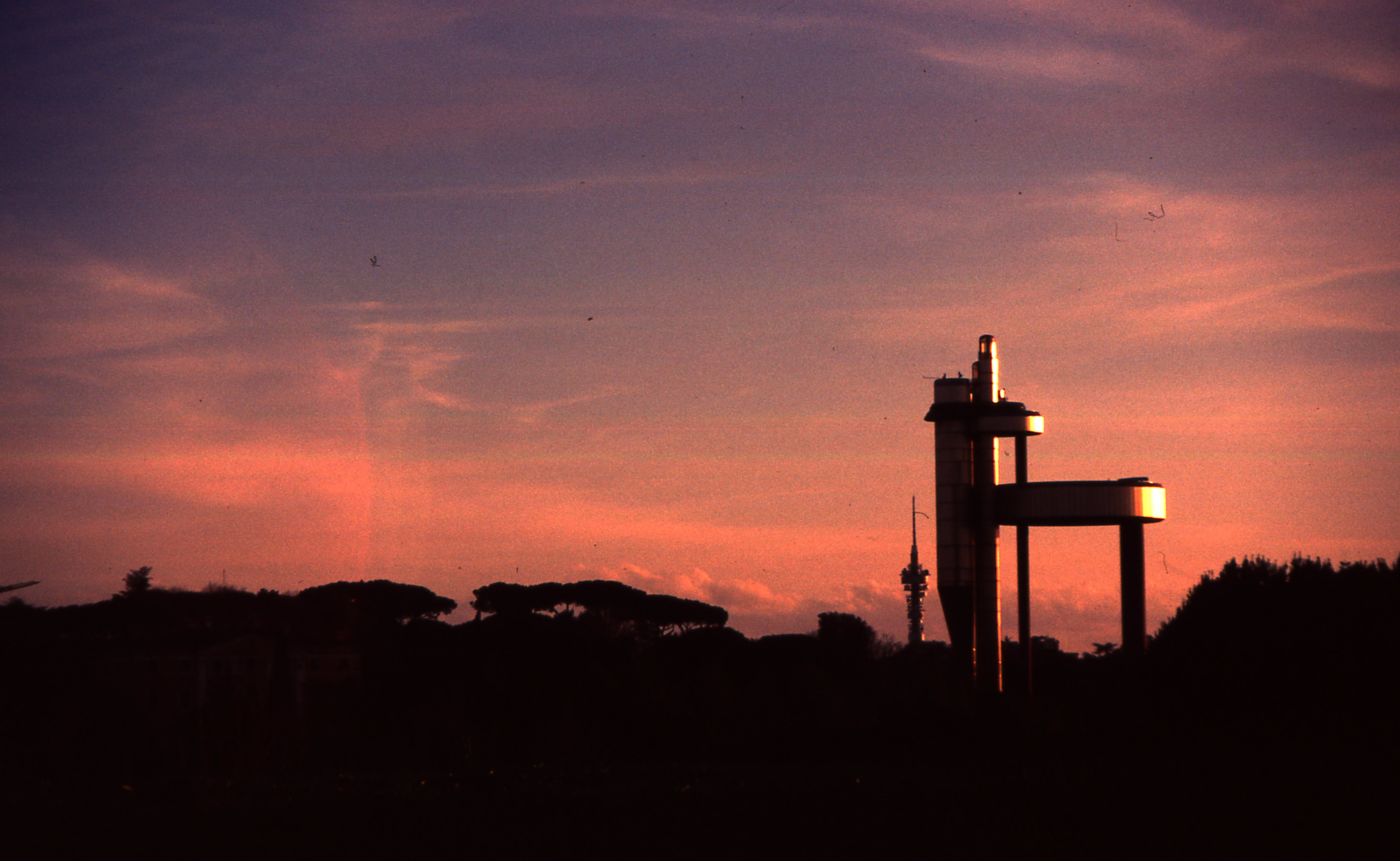 Foto di un tramonto scattata dall'istituto agrario Giuseppe Garibaldi della Torre Piezometrica appartenente al Centro Idrico Eur Roma di Palpacelli,alla sua sinistra si può ben notare la torre Telecom. La fotografia è stata scattata su diapositiva Fuji Velvia con fotocamera Nikon FM2 e riportata in digitale con uno scanner per positivi e negativi.